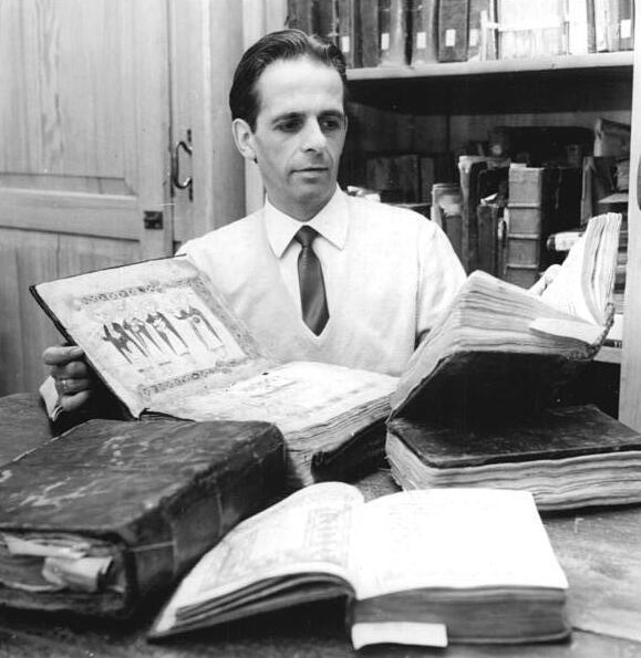 Zentralbild Deutsche Demokratische Republik 20.1.1968 Deutsche Morgenländische Gesellschaft in Halle 50.000 Bände zählt der Gesamtbestand der Bibliothek der Deutschen Morgenländischen Gesellschaft, die von der Universitäts- und Landesbibliothek Halle verwaltet wird. Studenten und Wissenschaftler der Universitätsinstitute für Orientalistik, Indologie, Byzantinistik und Orientarchäologie, sowie arabische Studenten und Wissenschaftler der verschiedenen Fachrichtungen zählen zu den Benutzern dieser orientalischen Spezialbibliothek. Eine Fernausleihe an wissenschaftliche Einrichtungen in der ganzen Welt wird hier ebenfalls durchgeführt. UBz: Orientarchäologe Dr. Herbert Plaeschke bei wissenschaftlichen Arbeiten mit mittelalterlichen vorderasiatischen Handschriften. Foto: Schaar Copyright: Zentralbild